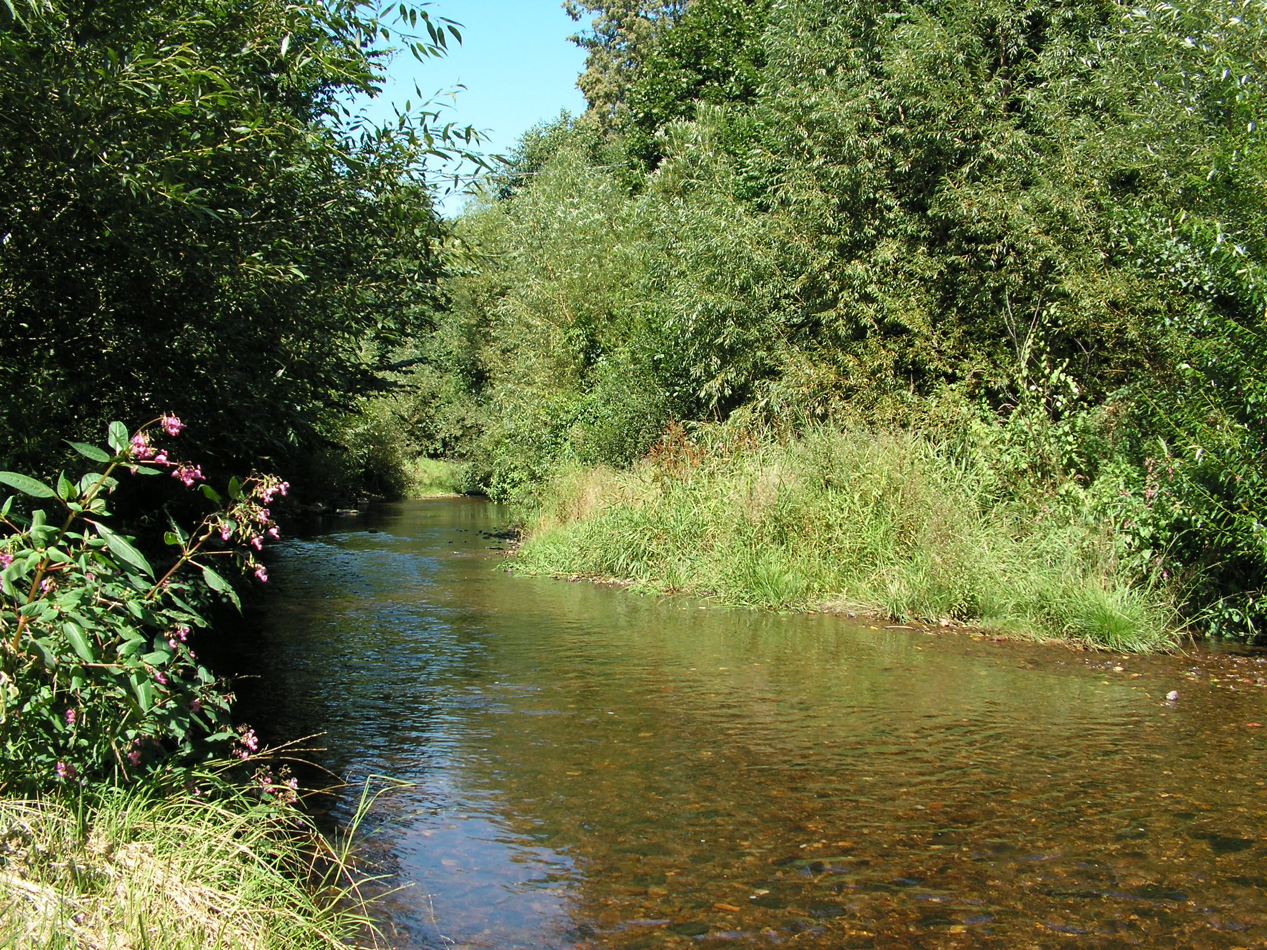 Říčka Fryšávka nad ústím do Svratky v Jimramově